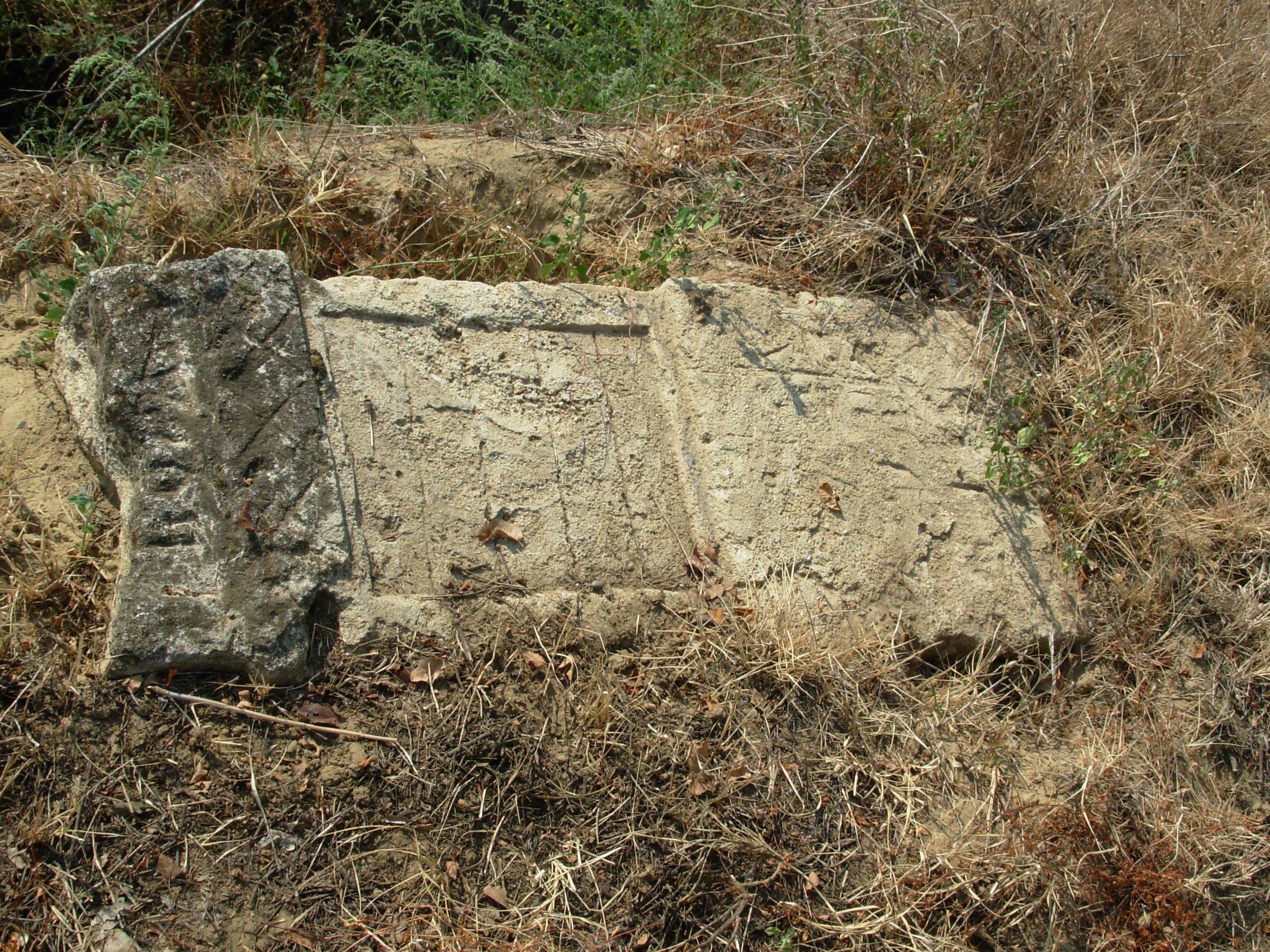 Оброчен кръст в местността "Горуне" с. Ново село, област Видин